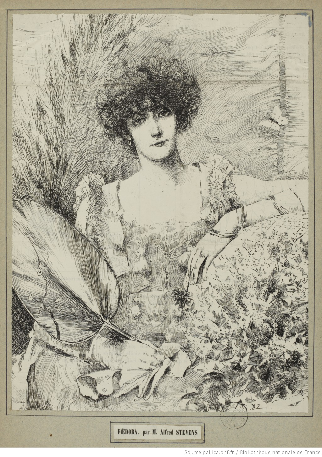 Sarah Bernhardt, lithographie d'Alfred Stevens pour le supplément du Gaulois à l'occasion de la première de Fédora, drame de Victorien Sardou au Théâtre du Vaudeville (Paris), le 11 décembre 1882